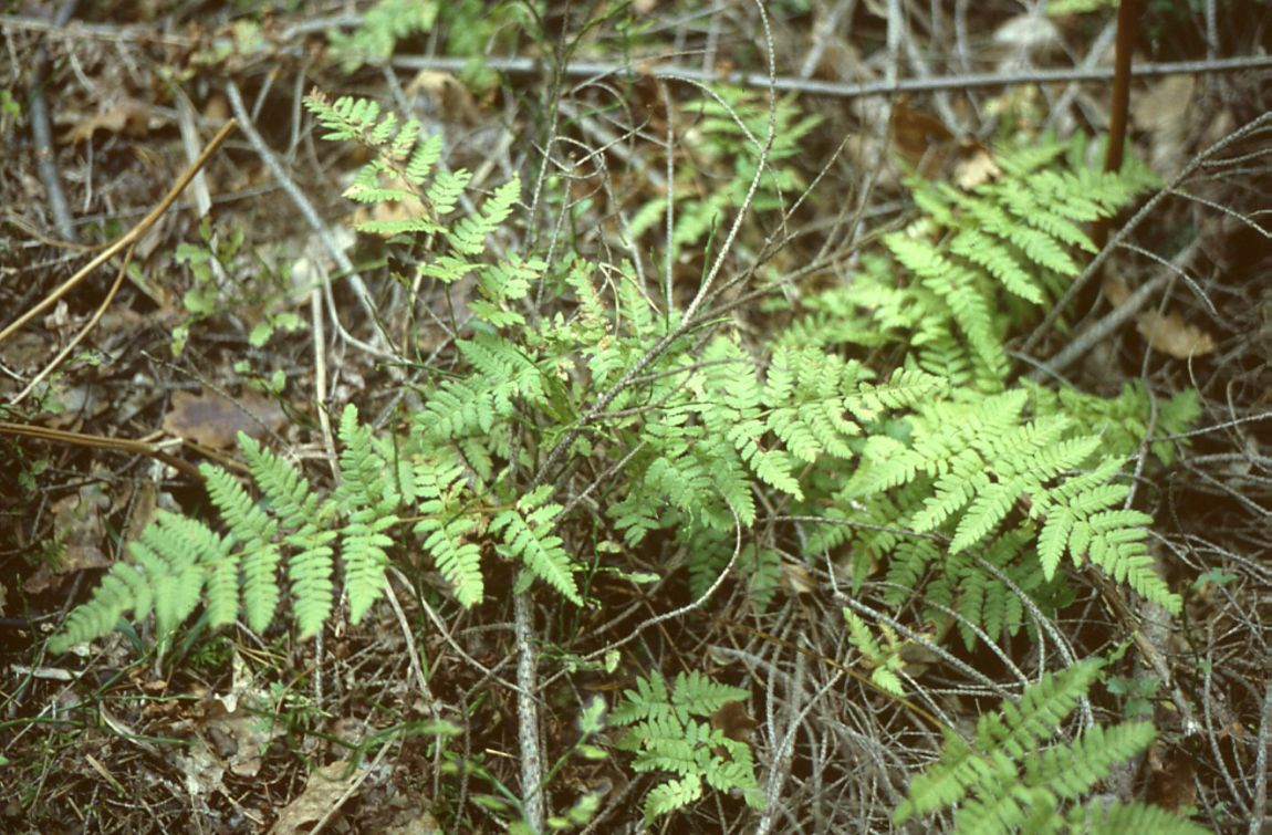 Kleiner Dornfarn (Dryopteris carthusiana (Vill.) H.P.Fuchs), Schildfarngewächse (Aspidiaceae) - Österreich/Austria/Autriche: Kärnten, Dobrowa bei Völkermarkt